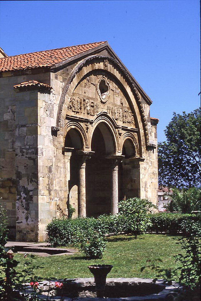 Trabzon: église Sainte-Sophie